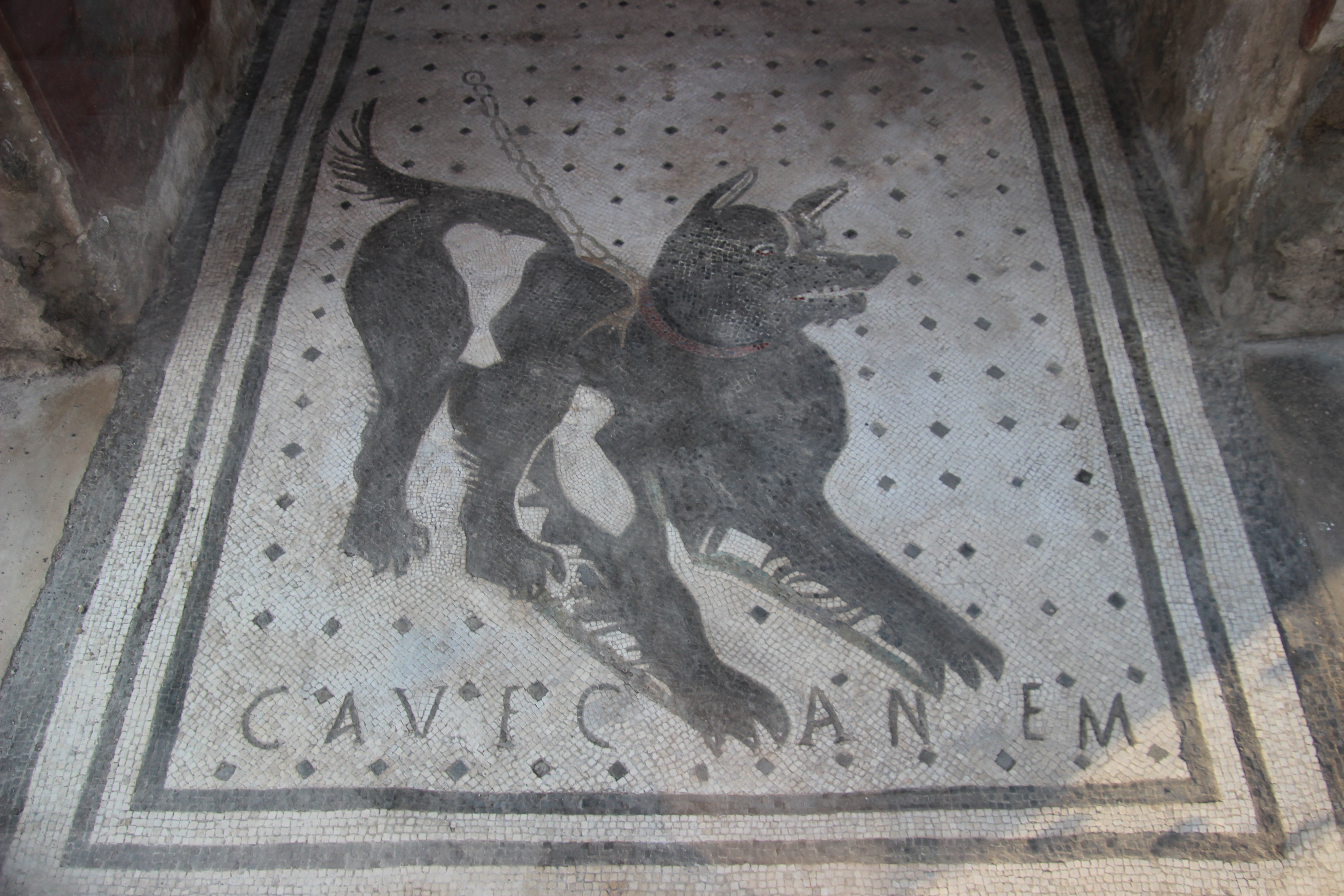 Pompeya. Casa del Poeta Trágico. Mosaico en la entrada.